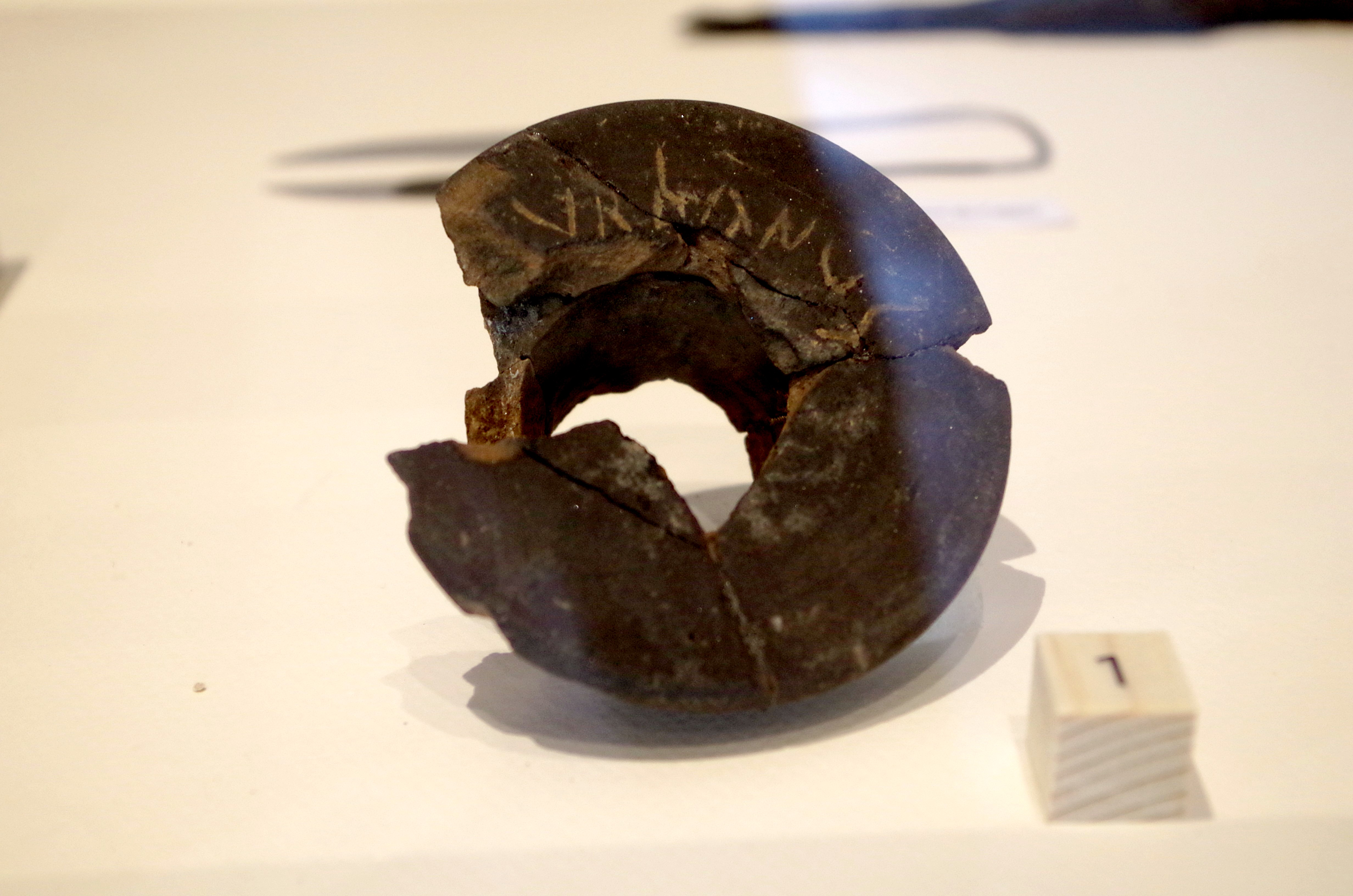 Graffite Vrbanvs Amboise trouvé à Amboise. Voir Jean-Marie Laruaz (dir.), Ambacia, la Gauloise - 100 objets racontent la ville antique d'Amboise, Chemillé-sur-Dême, Archéa, 2017, p. 50.